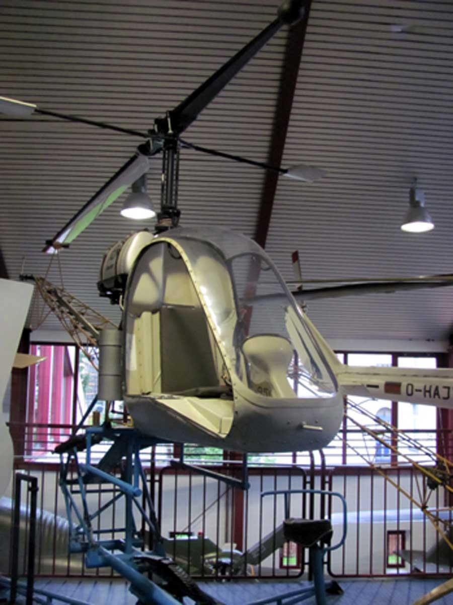 Bölkow Bo 102 Helitrainer im Hubschraubermuseum Bückeburg